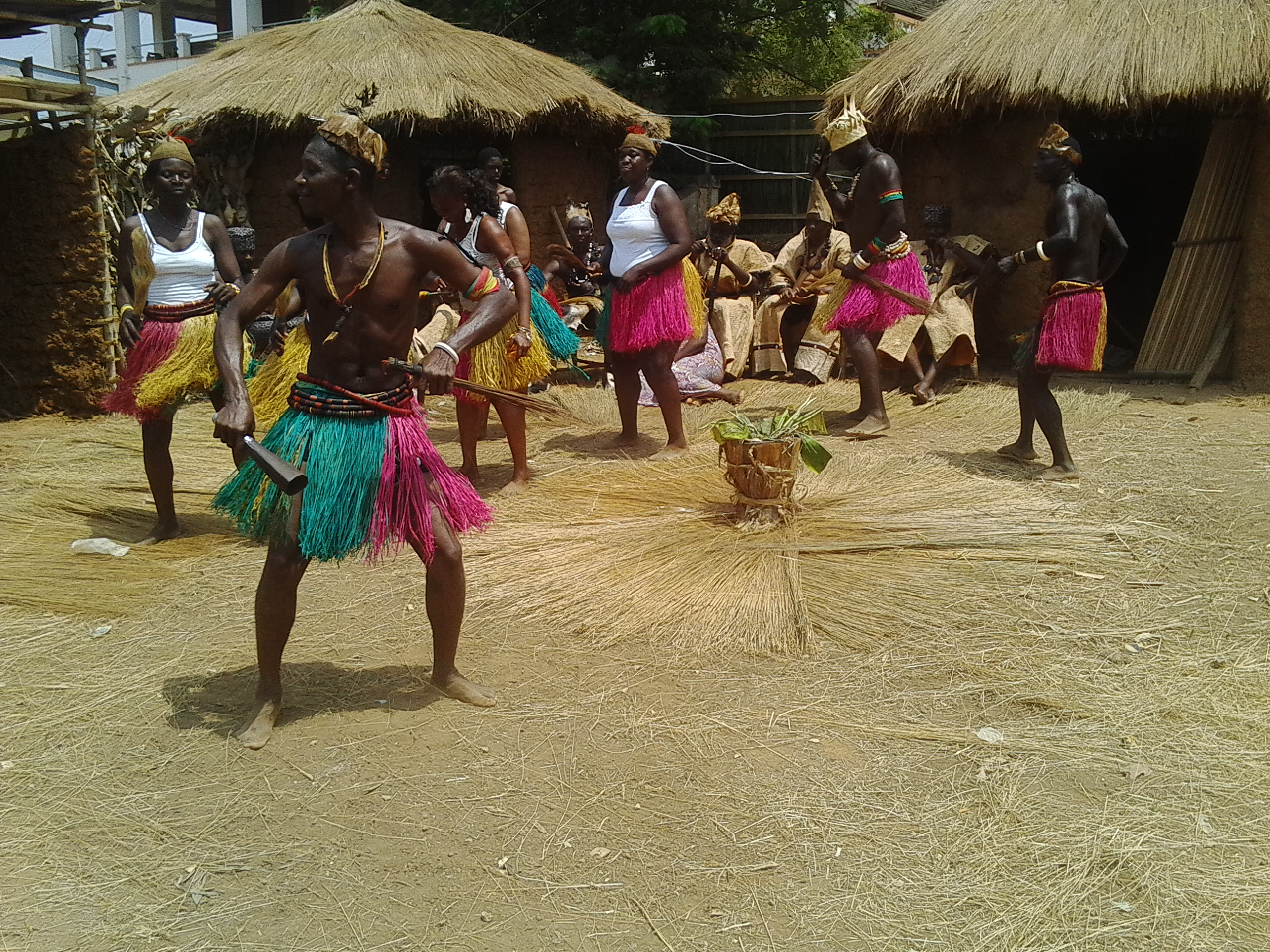 Répétition de la danse Bafia lors de Mbam'Art 2015. This is an image with the theme "Play" from: Cameroon